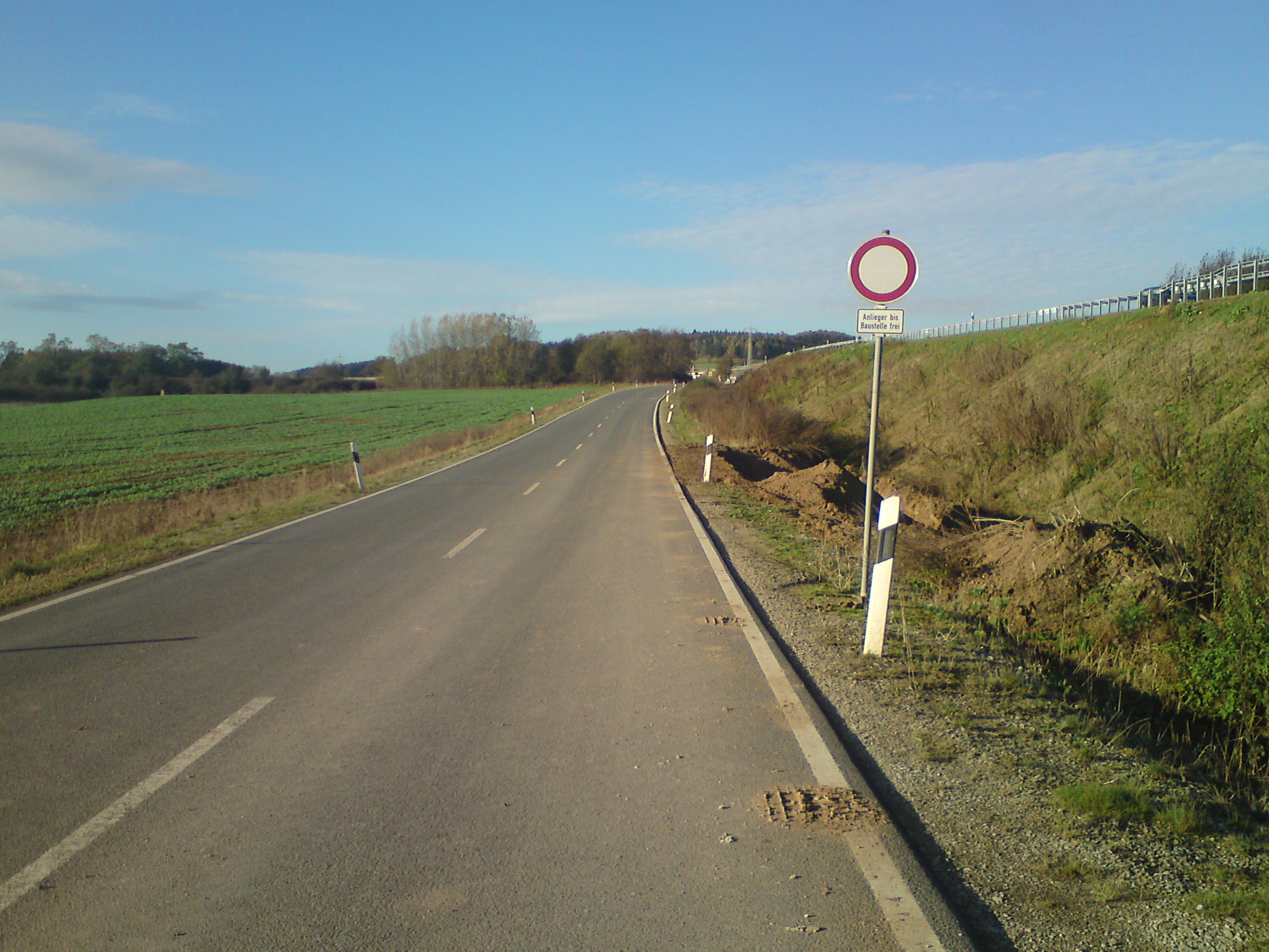 ehemalige Bundesstraße 243 zwischen Nüxei und Osterhagen; oben rechts die neue, dreispurige Schnellstraße